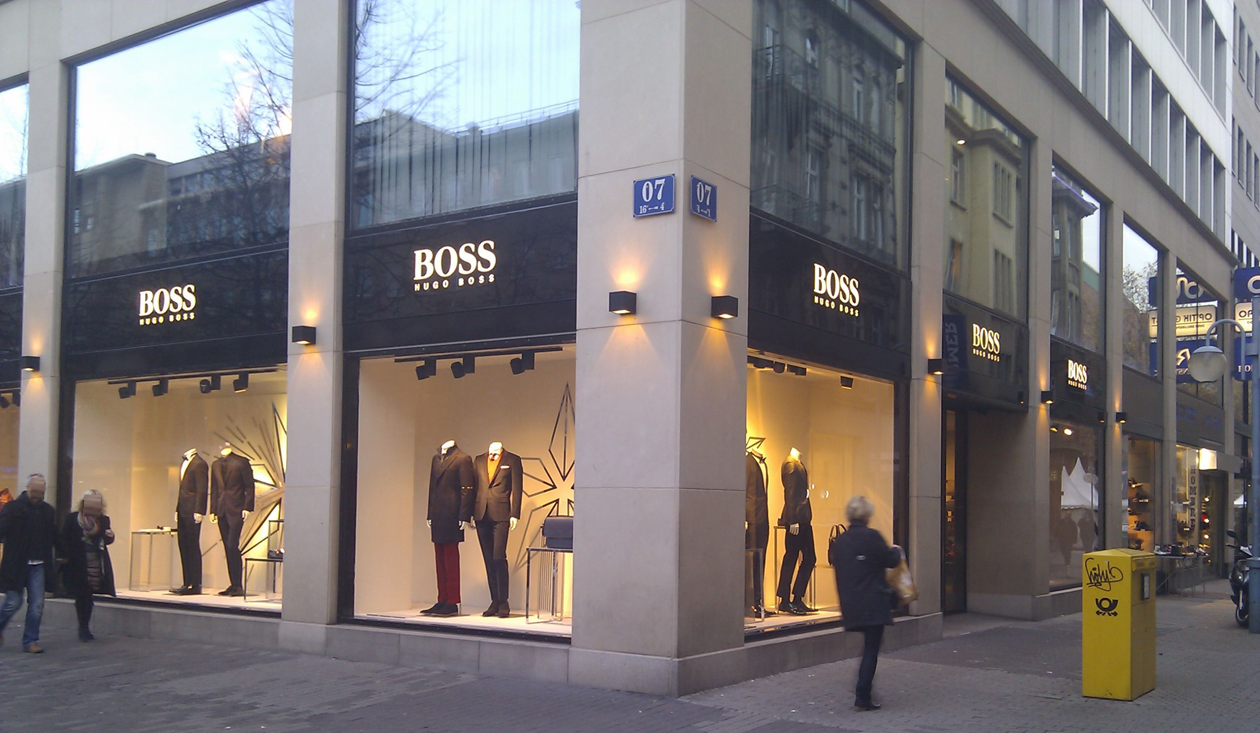 Geschäfte Mannheim O7